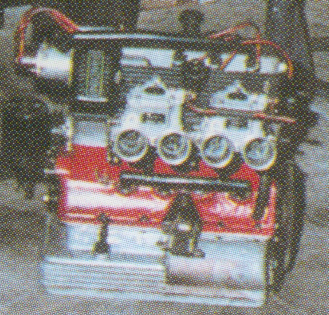 Motore Bandini 850 c.c. foto tratta dal libro Bandini